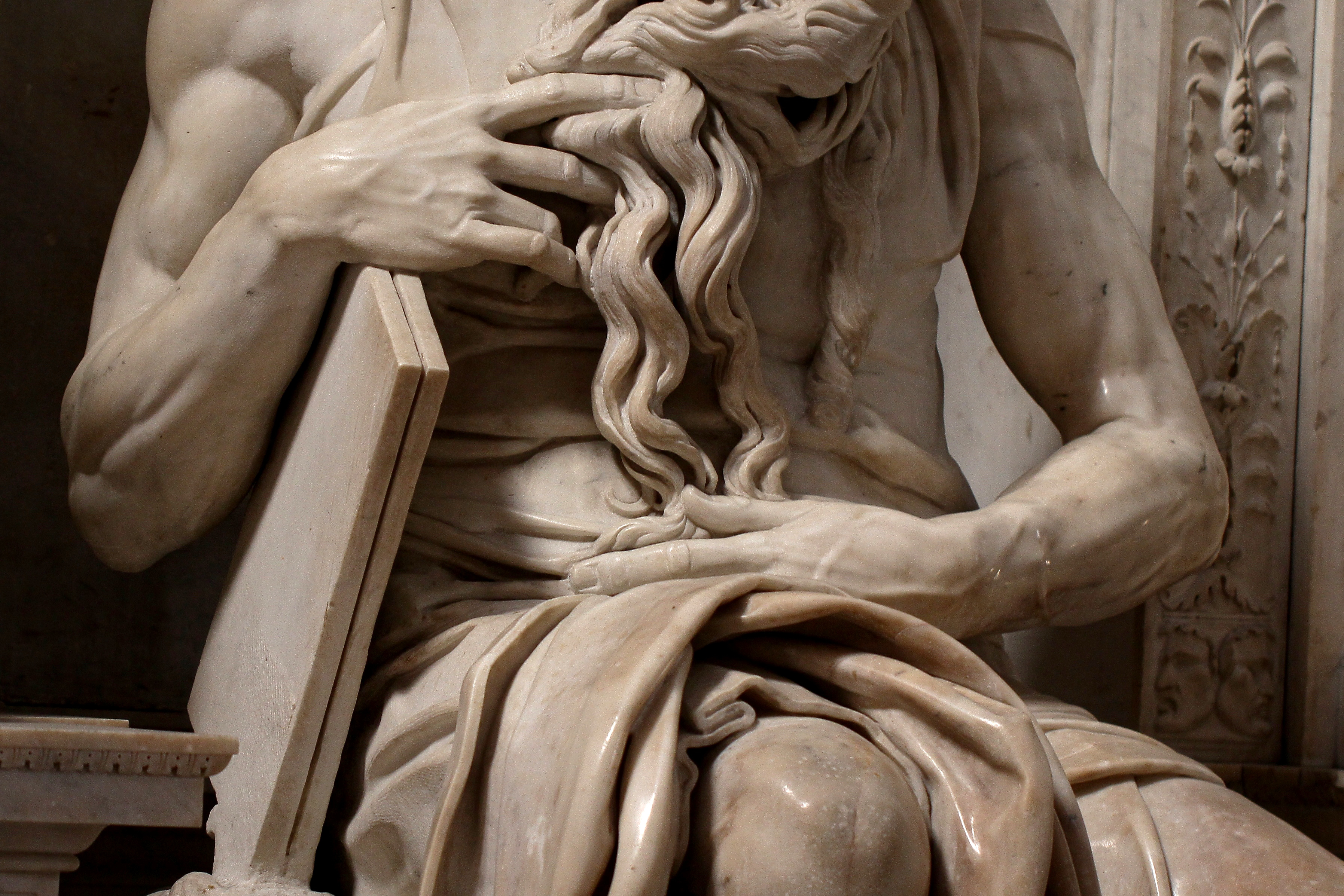 Moses (1513-15) von Michelangelo Buonarroti, Detail, Grabmal (1505 bis 1545) für Julius II., San Pietro in Vincoli (Rom)